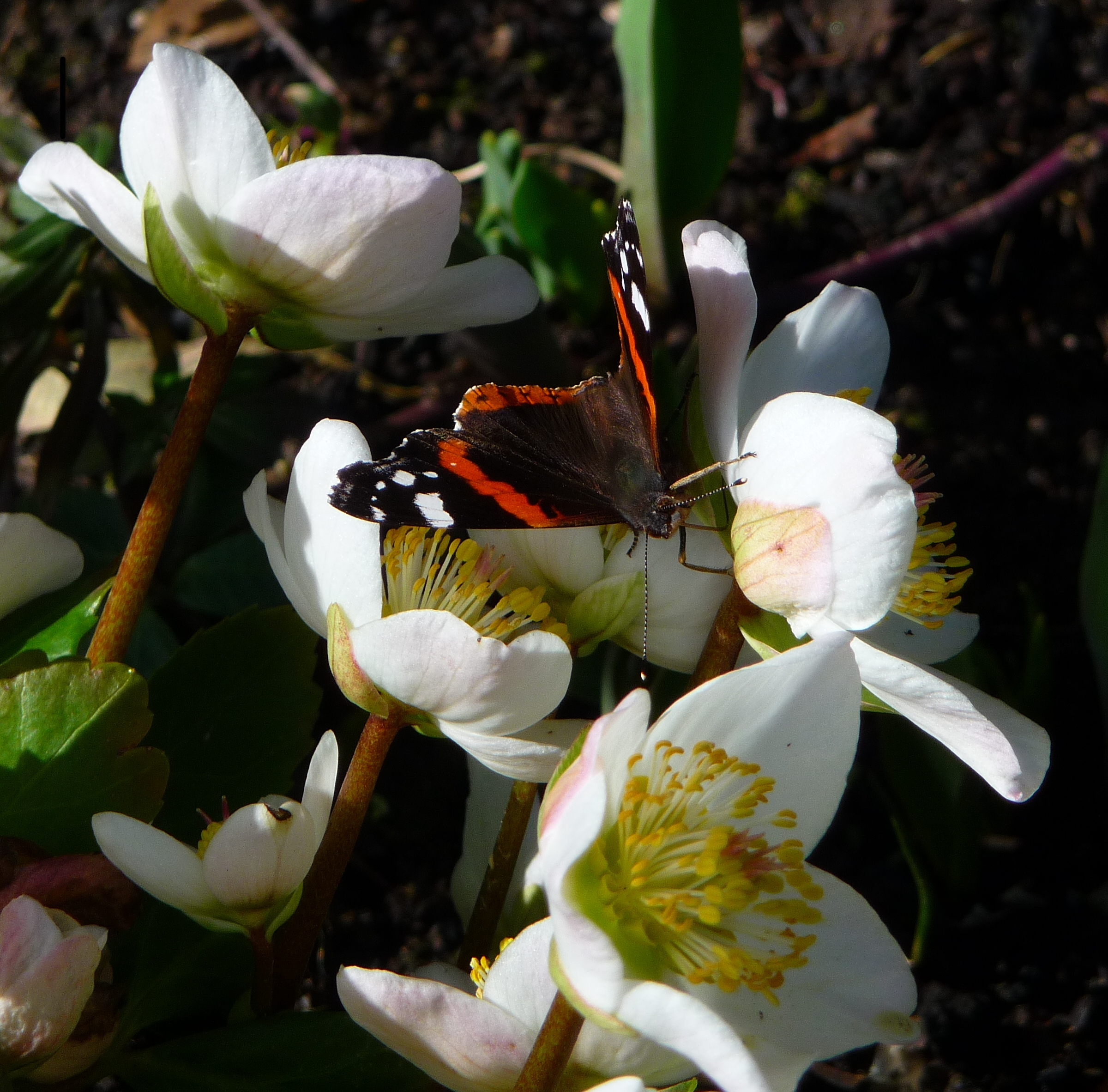 Admiral (Vanessa atalanta) auf der Blüte einer Christrose (Helleborus niger), fotografiert in Nordbaden (Baden-Württemberg, Deutschland) bei einer Außentemperatur von 13 Grad Celsius